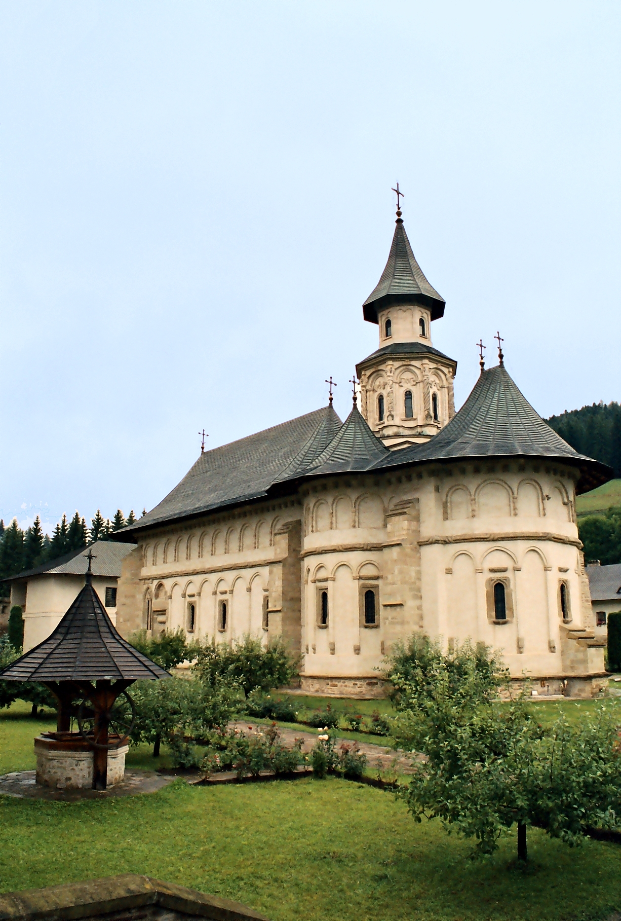 Fotografie realizata cu aparatul propriu Konica Minolta Dynax 4, la data de 11 august 2006.